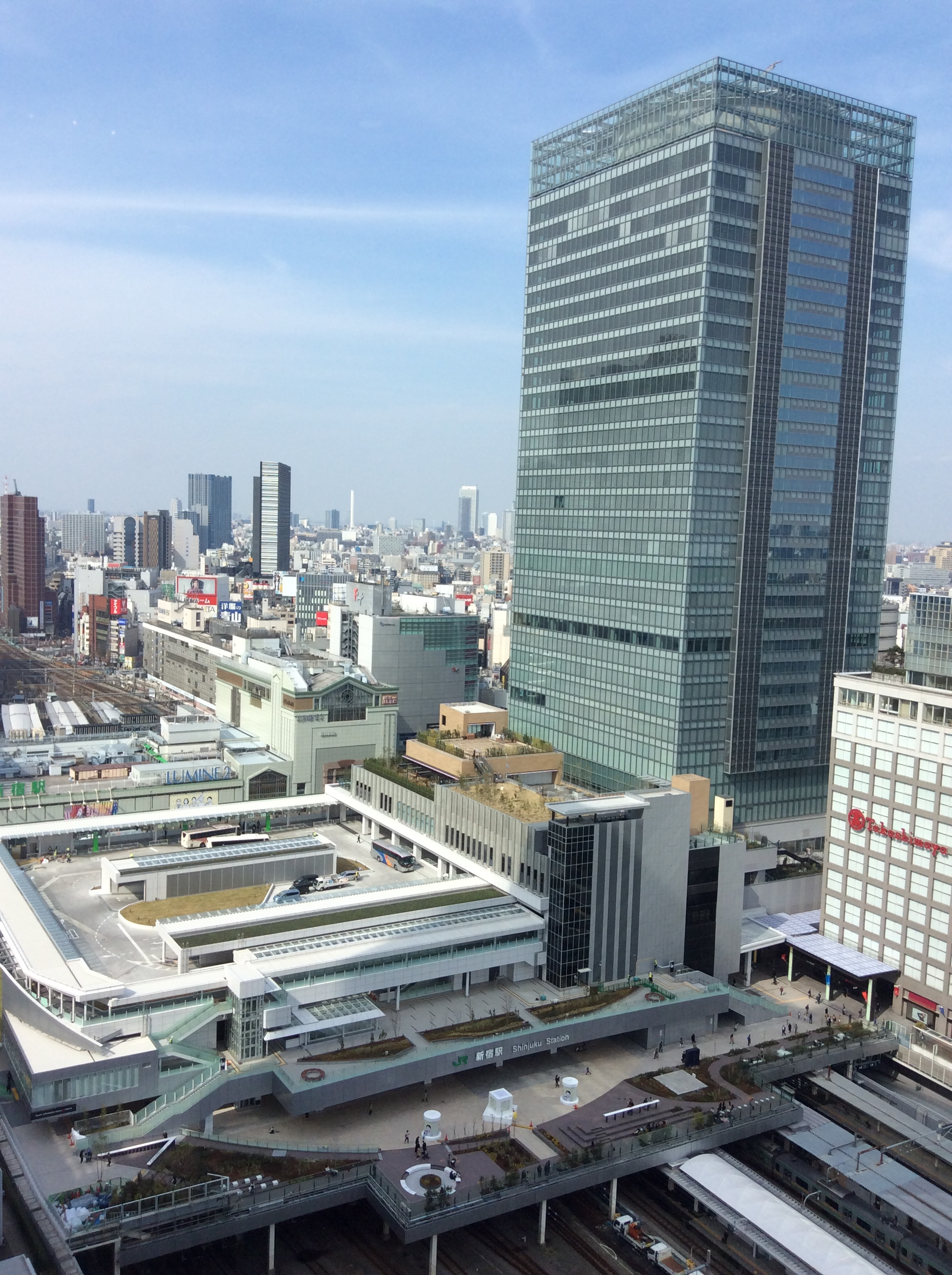 JR 新宿ミライナタワー